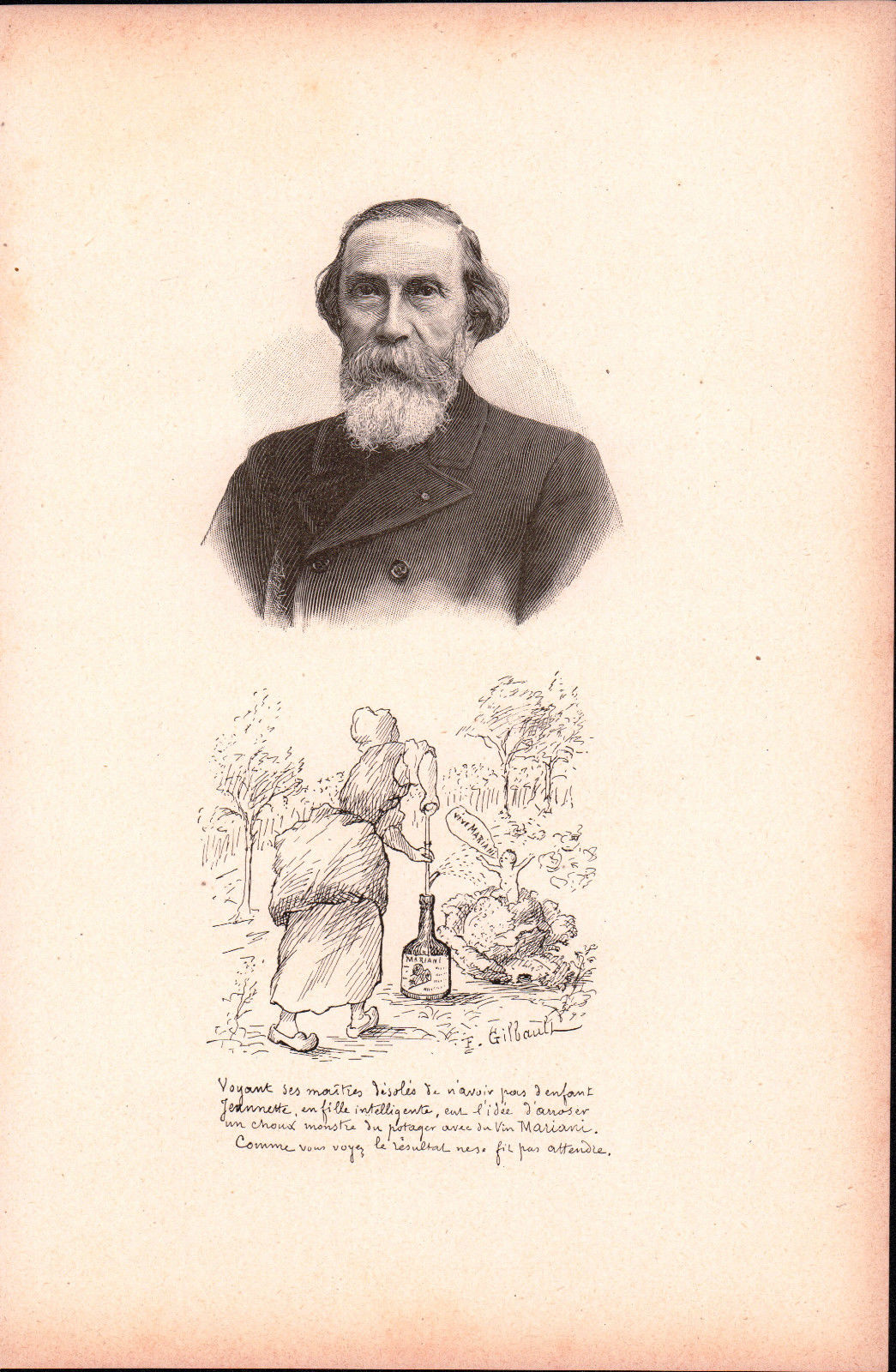 Gravure publicitaire par F. Gibaut: vin Mariani. Portrait de l'auteur.